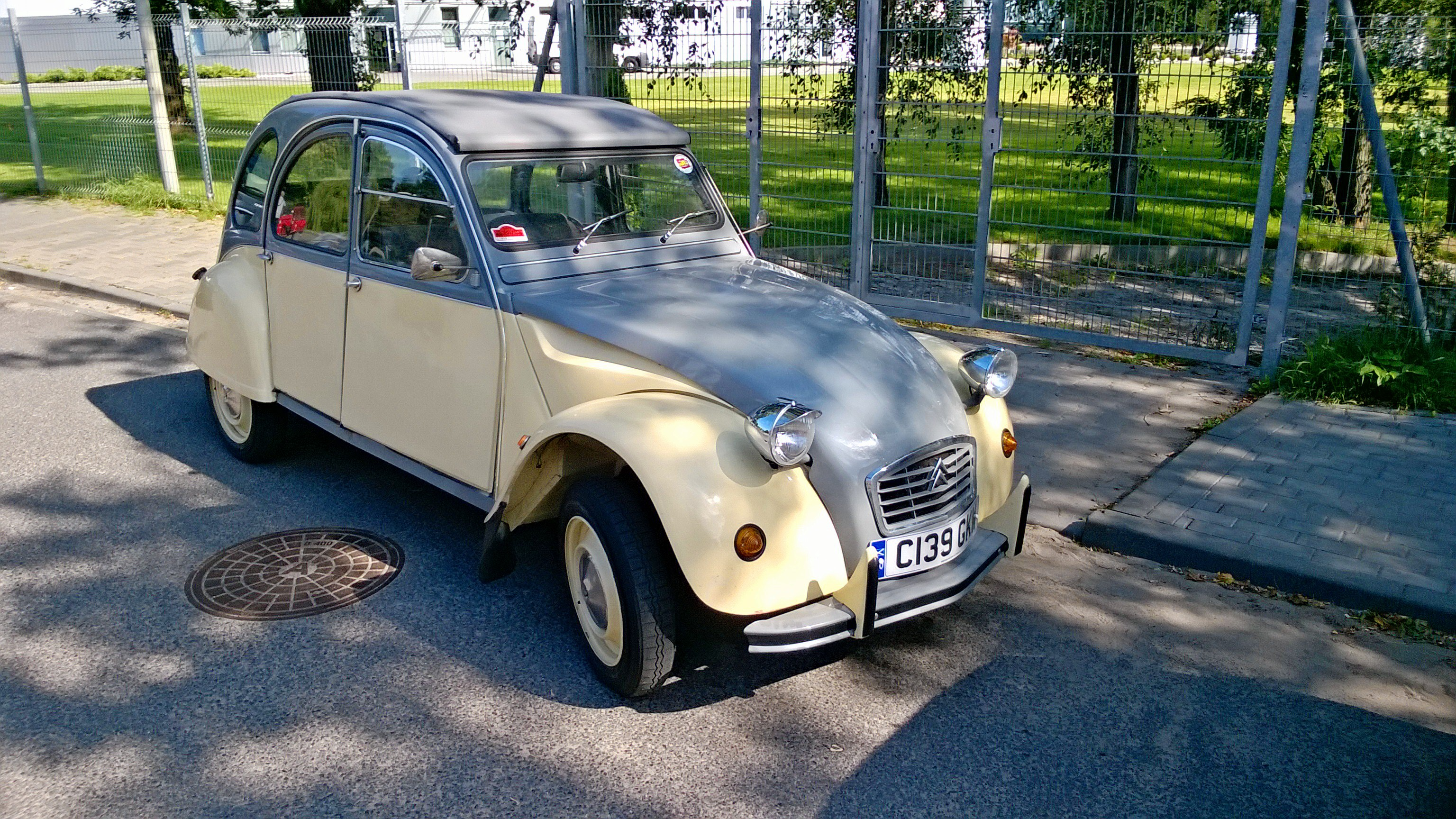 21. Międzynarodowego Zlotu Miłośników Citroena 2CV w Toruniu